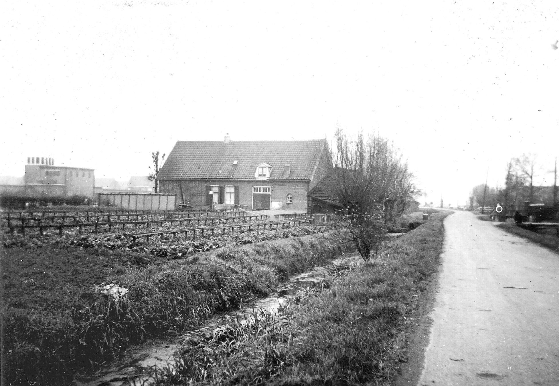 Hoveniers in Utrecht, Tuinderij op Zandpad 16, Utrecht, Nederland. Omstreeks 1957. Links aan de overkant van de Vecht het zwembad het Noorderbad.